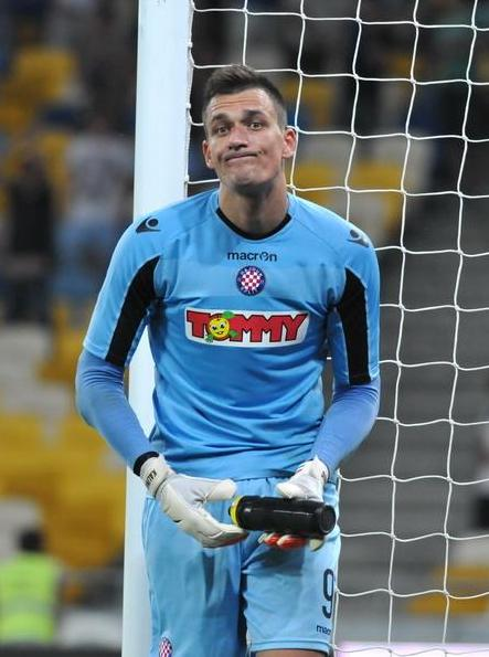 Igor Tudor on game Dnipro - Hajduk